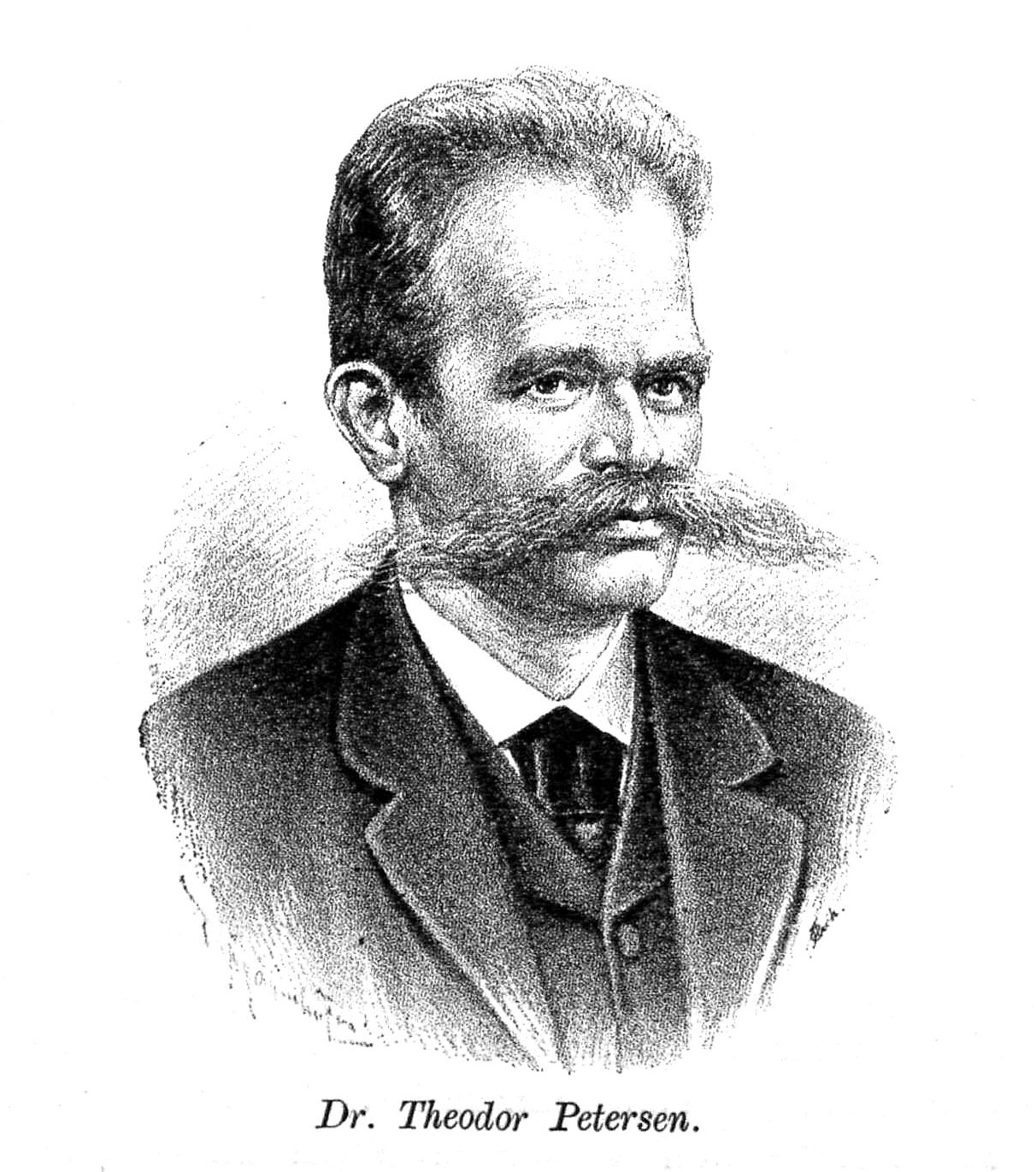 Dr. Theodor Petersen aus Zeitschrift des Deutschen und Oesterreichischen Alpenvereins 1894 Band 25